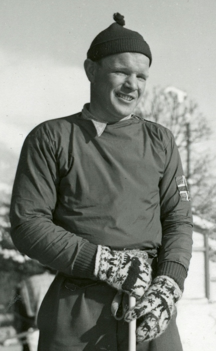 Sigmund Ruud